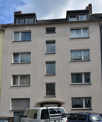 Stolpersteine Dortmund